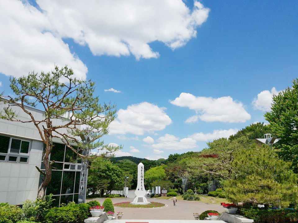 추모관 전경